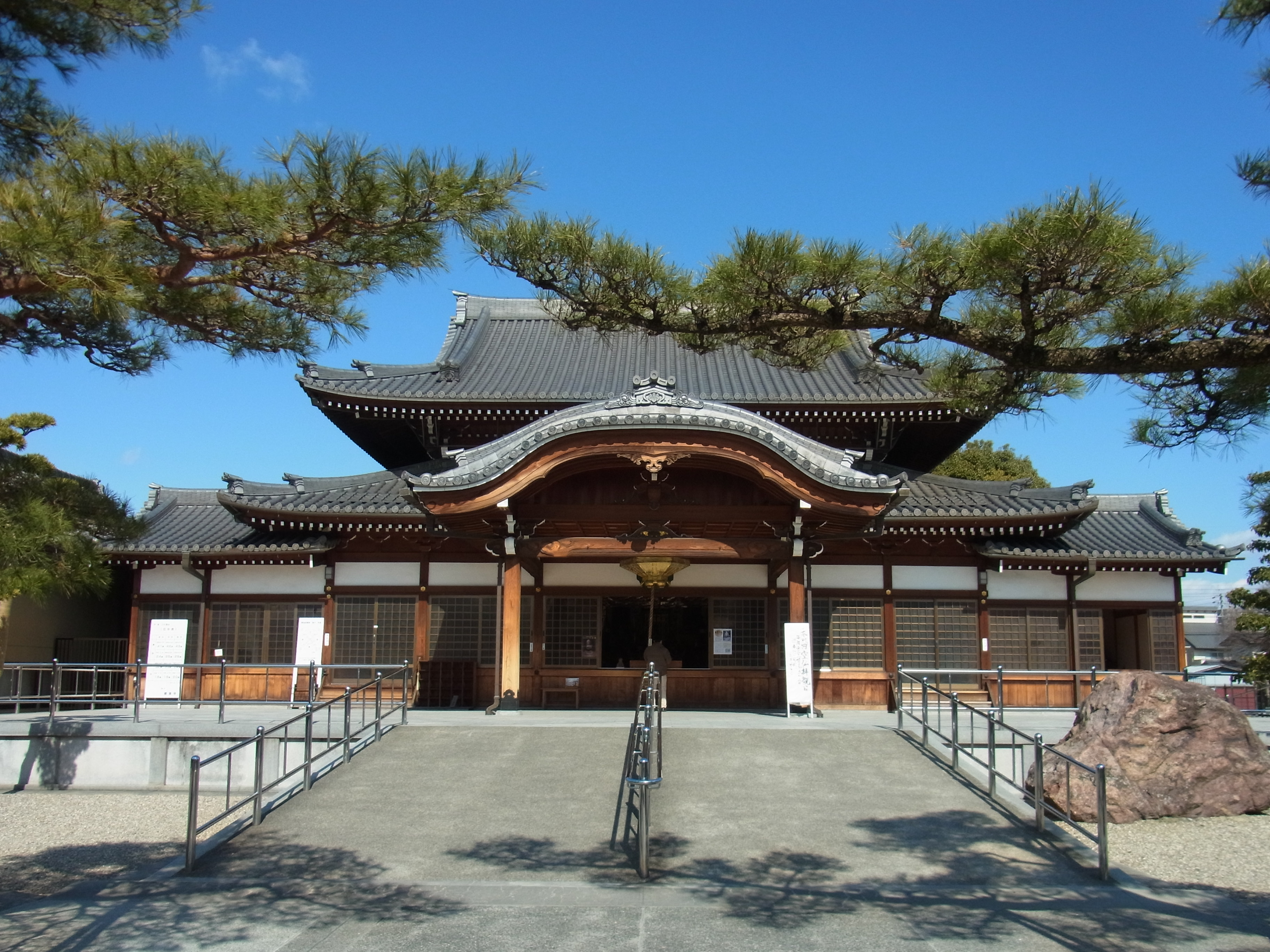 荒子観音本堂